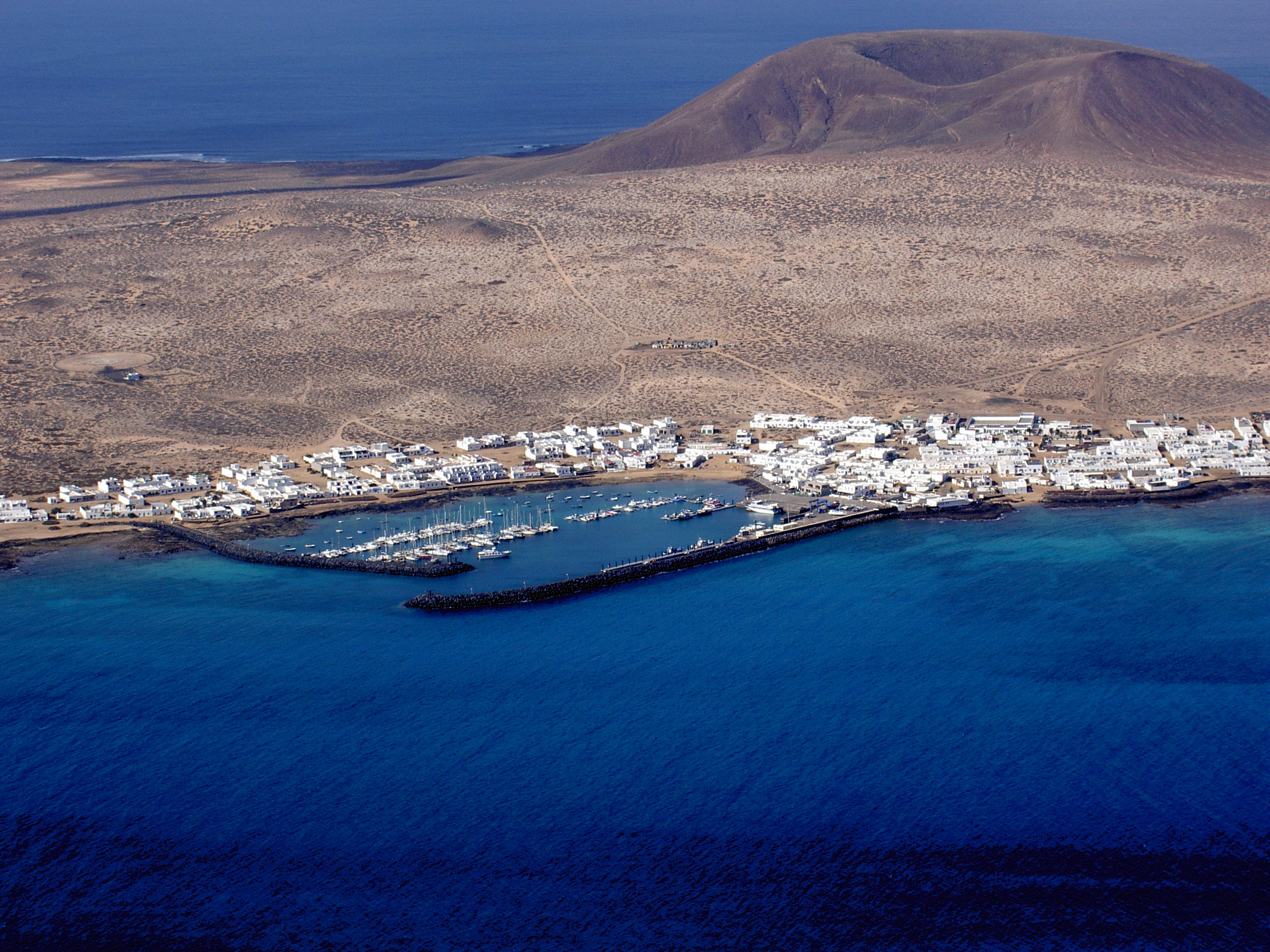 Vista de Caleta de Sebo